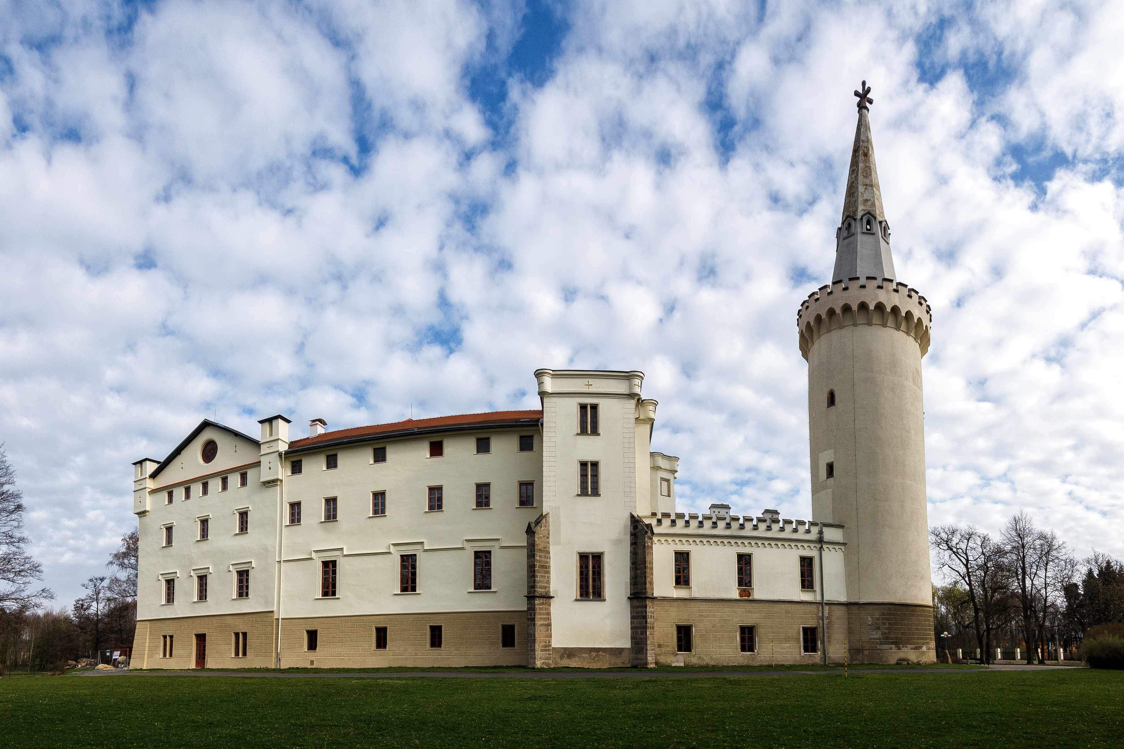 Zámek Bor, panoramatický pohled z jižní strany.